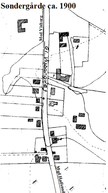 Søndergårde omkring 1900.